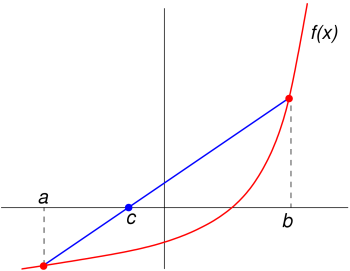 Illustration de l'article Méthode de la sécante Provient de la version anglaise de Wikipedia, en particulier la page : . Voir Image:Secant method.png.